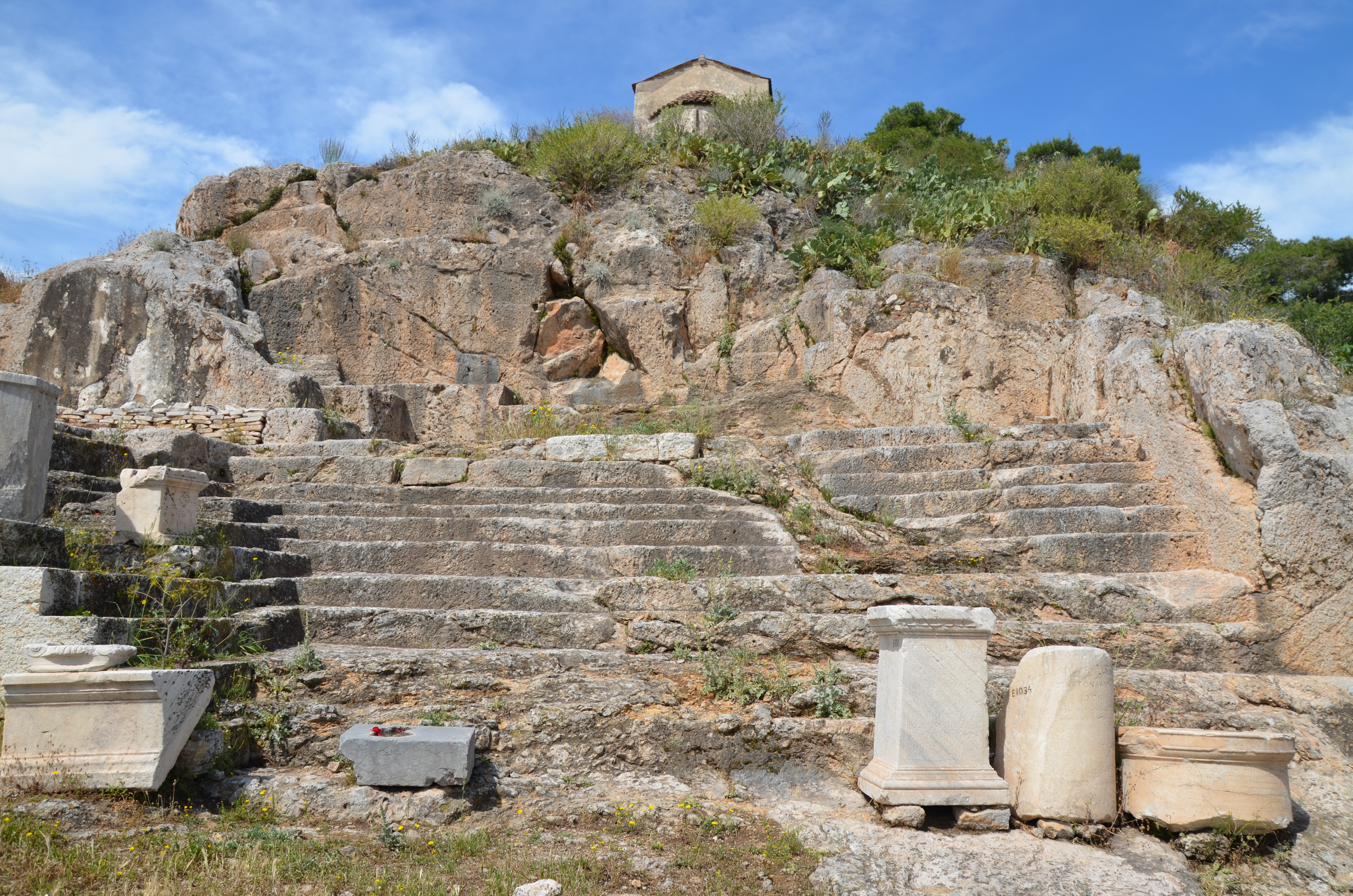 Eleusis